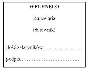 Wygląd prezenty